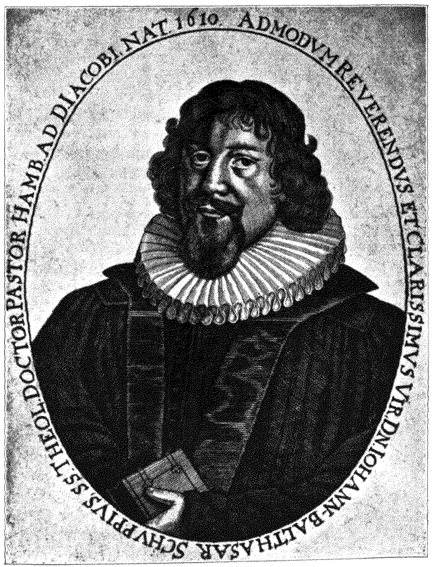 Johann Balthasar Schupp (1610-1661), deutscher Professor für Eloquenz und Geschichte, nach einem Stich von P. Aubry, Autotypie